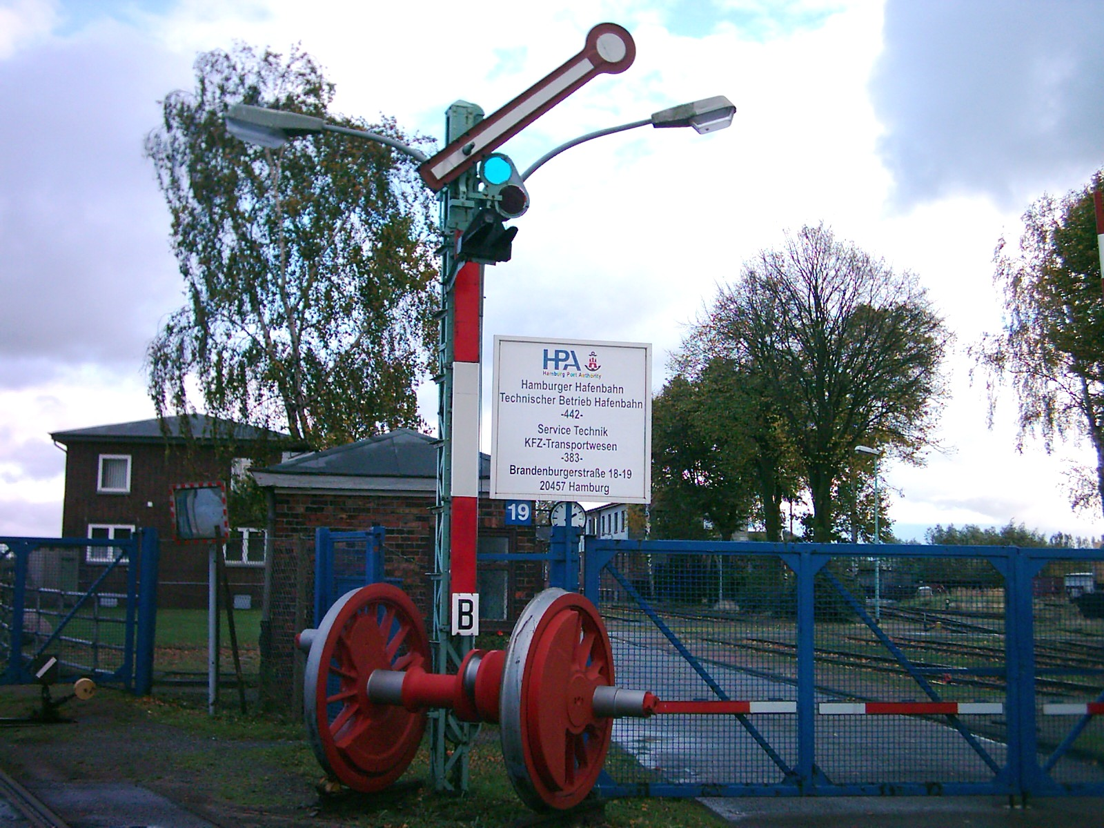 Technischer Betrieb der Hamburger Hafenbahn, Spreehafeninsel, Brandenburger Straße.